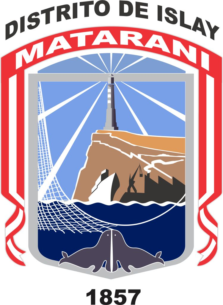 Escudo del Distrito de Islay - MDI